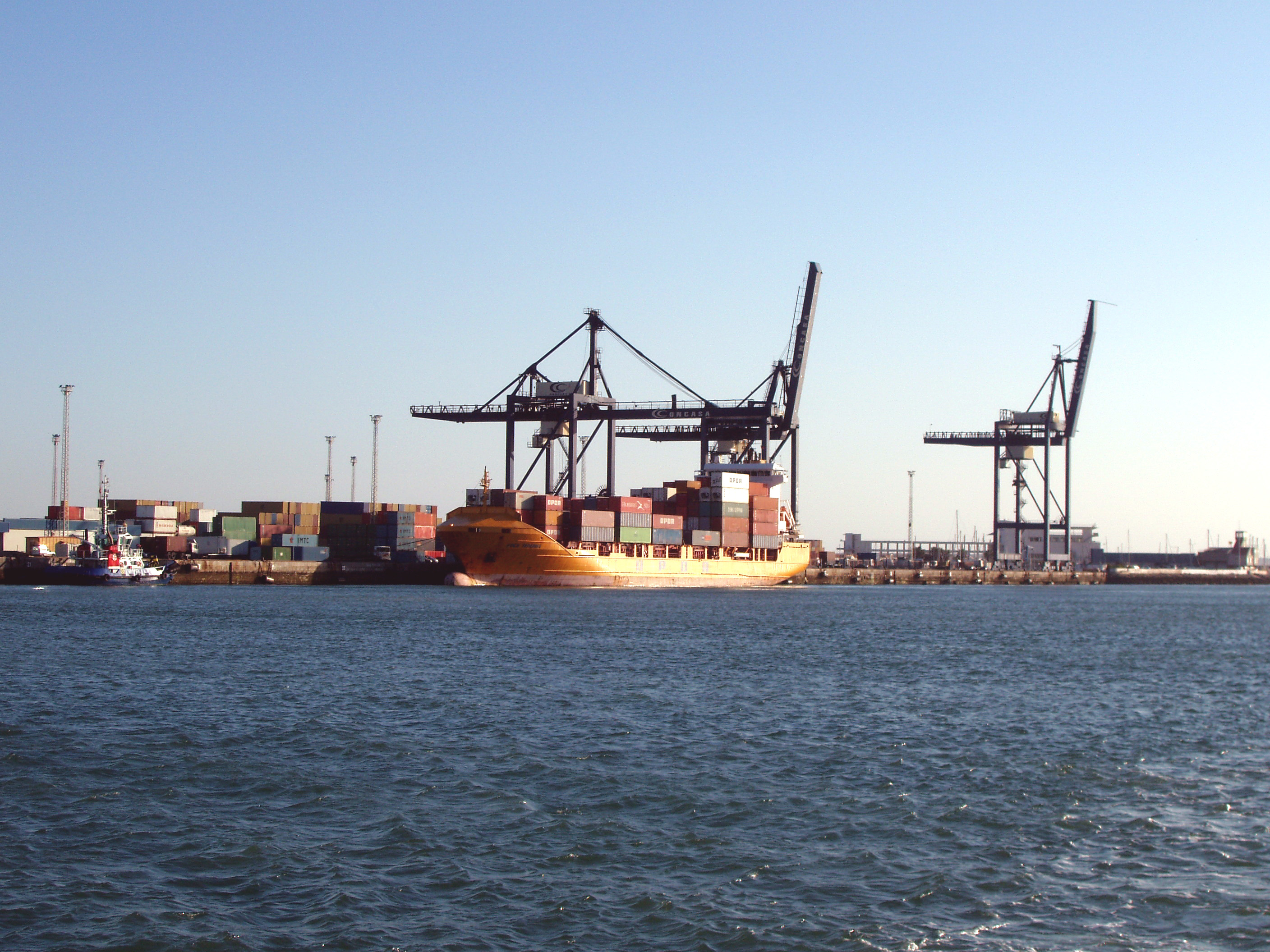 Focs Tenerife, bandera de España, 128 m de eslora, en el Puerto de la Bahía de Cádiz